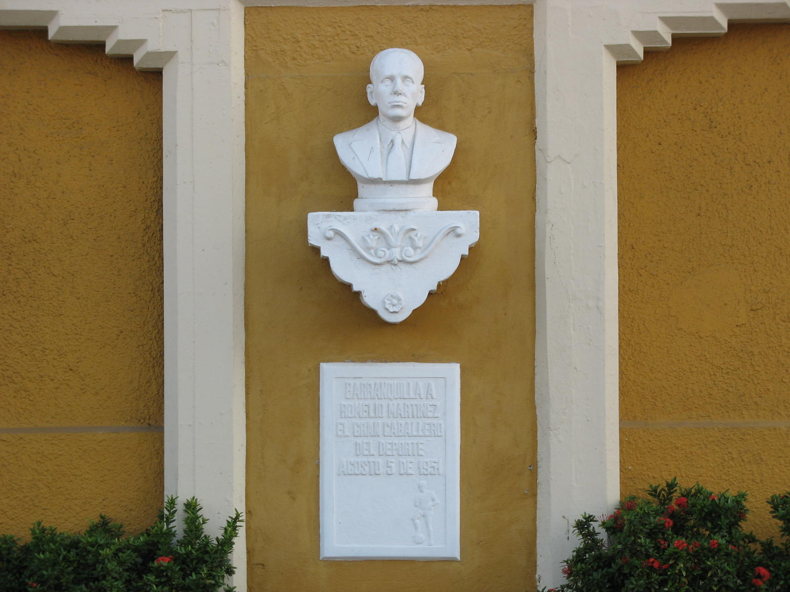 Busto de Romelio Martínez